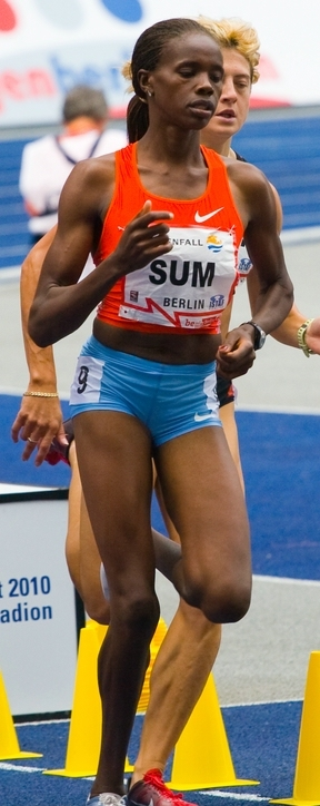 800m Frauen (Christin Wurth-Thomas, Eunice Sum, Fabienne Kohlmann, Elisa Cusma)